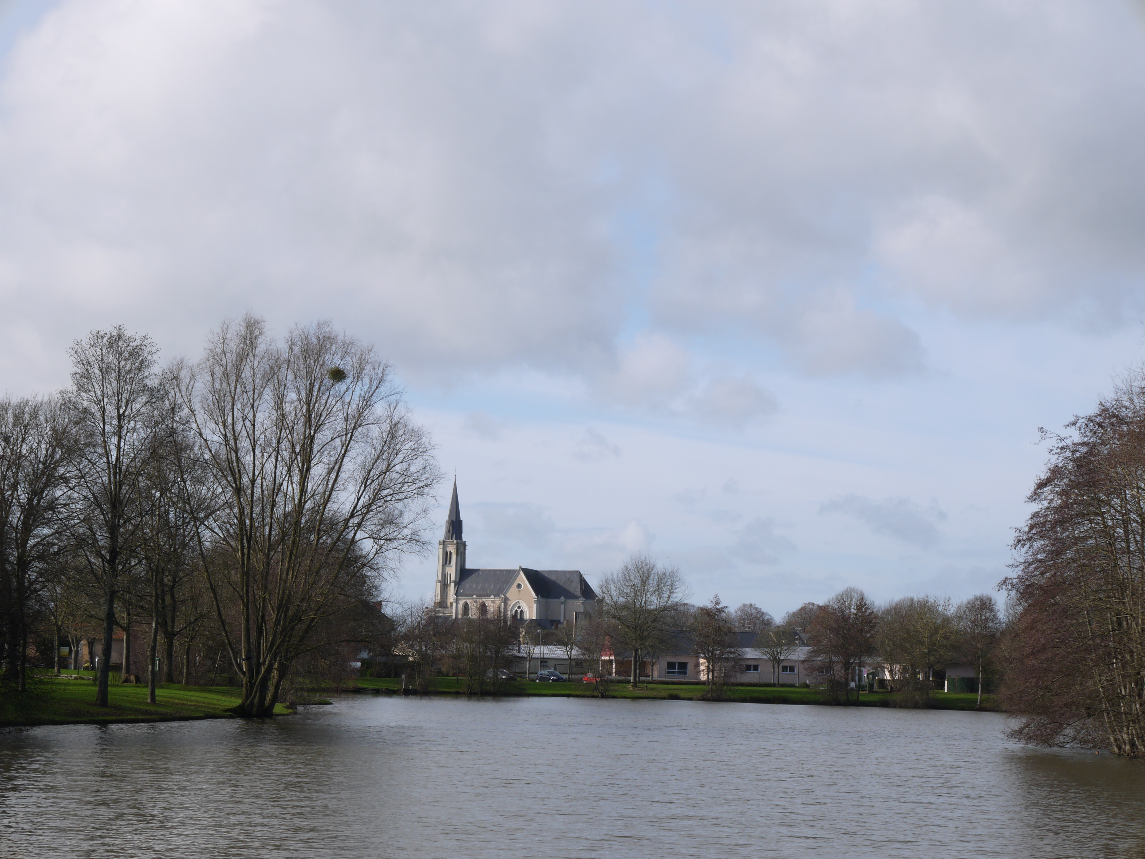 L'église et le village vus du plan d'eau du Mûrier